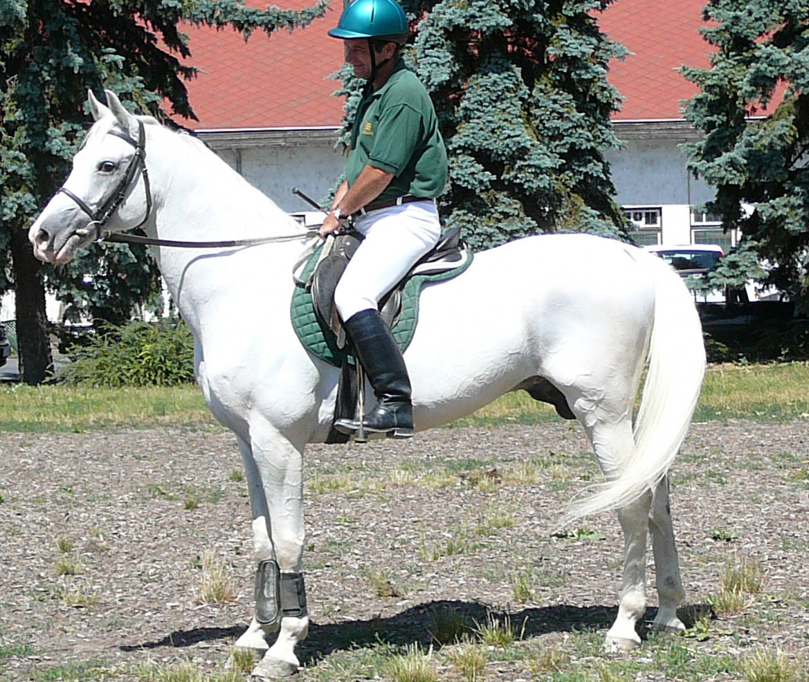 Cheval arabe shagya en compétition de cross en France